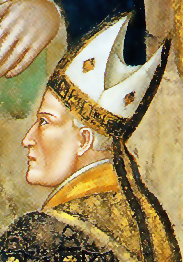 Simone Saltarelli, archevêque de Pise, originaire de Florence